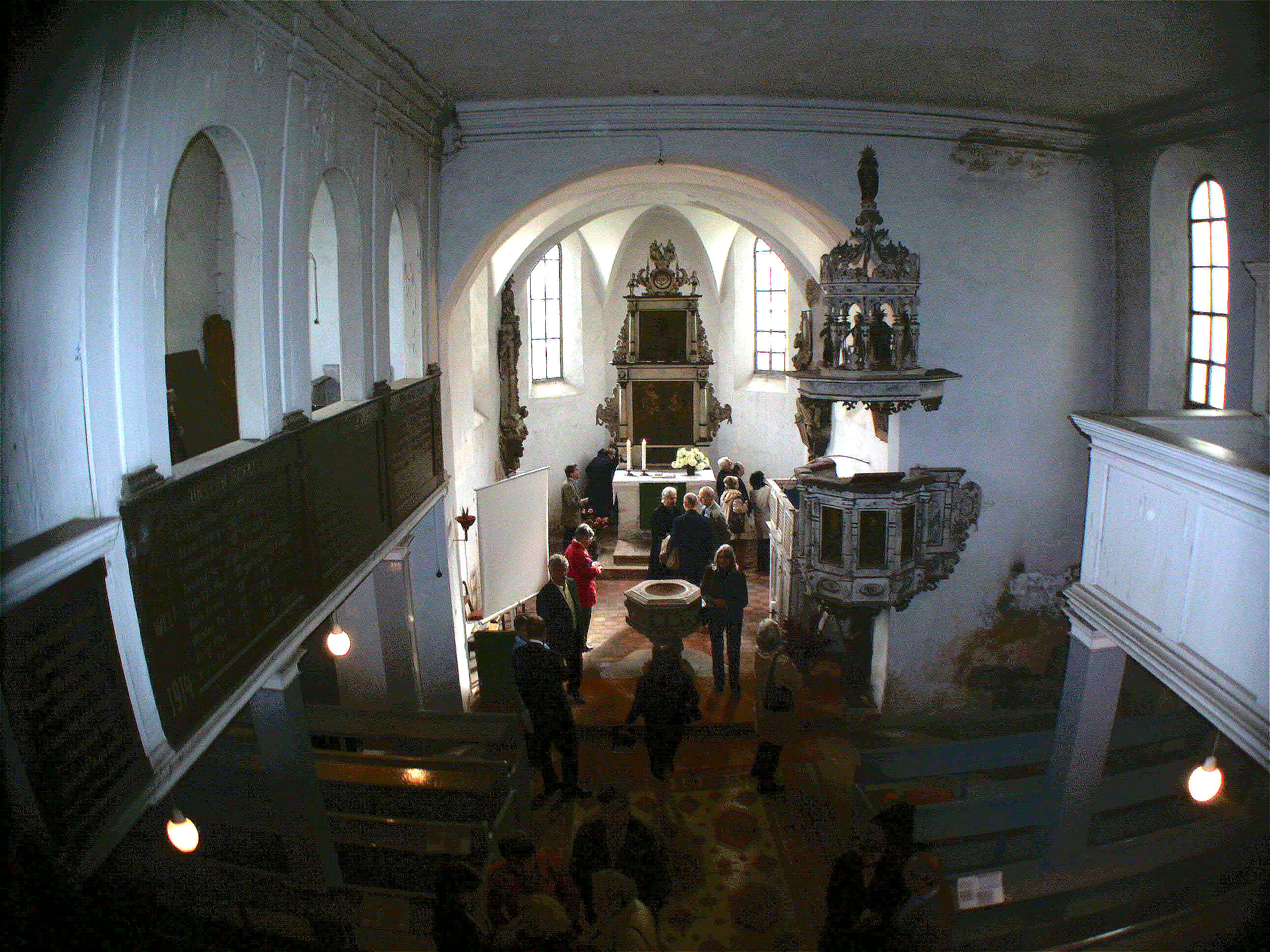 Blick in das Innere der Kirche Beuchlitz